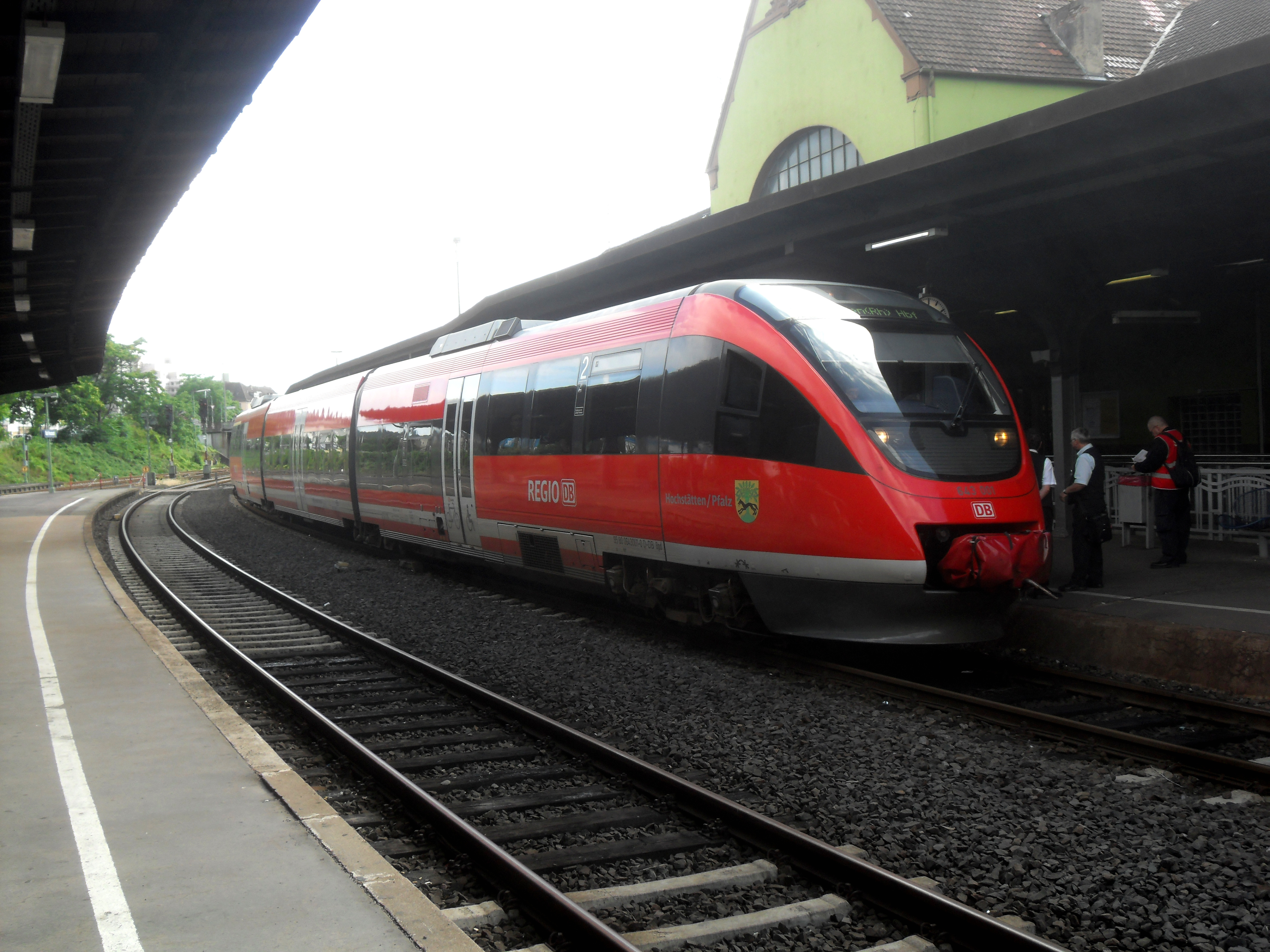 Eine Regionalbahn mit der DB AG-Baureihe 643 (Bombardier Talent) im Bahnhof Bad Kreuznach auf dem Weg nach Bingen (Rhein) Hauptbahnhof